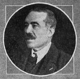 Fotografía de Pascual Serrano Gómez, maestro de primaria y arqueólogo, descubridor de las pinturas rupestres de la Cueva de la Vieja de Alpera (Albacete, España), publicada en mayo de 1912 con motivo de su ingreso en la Real Academia de la Historia.